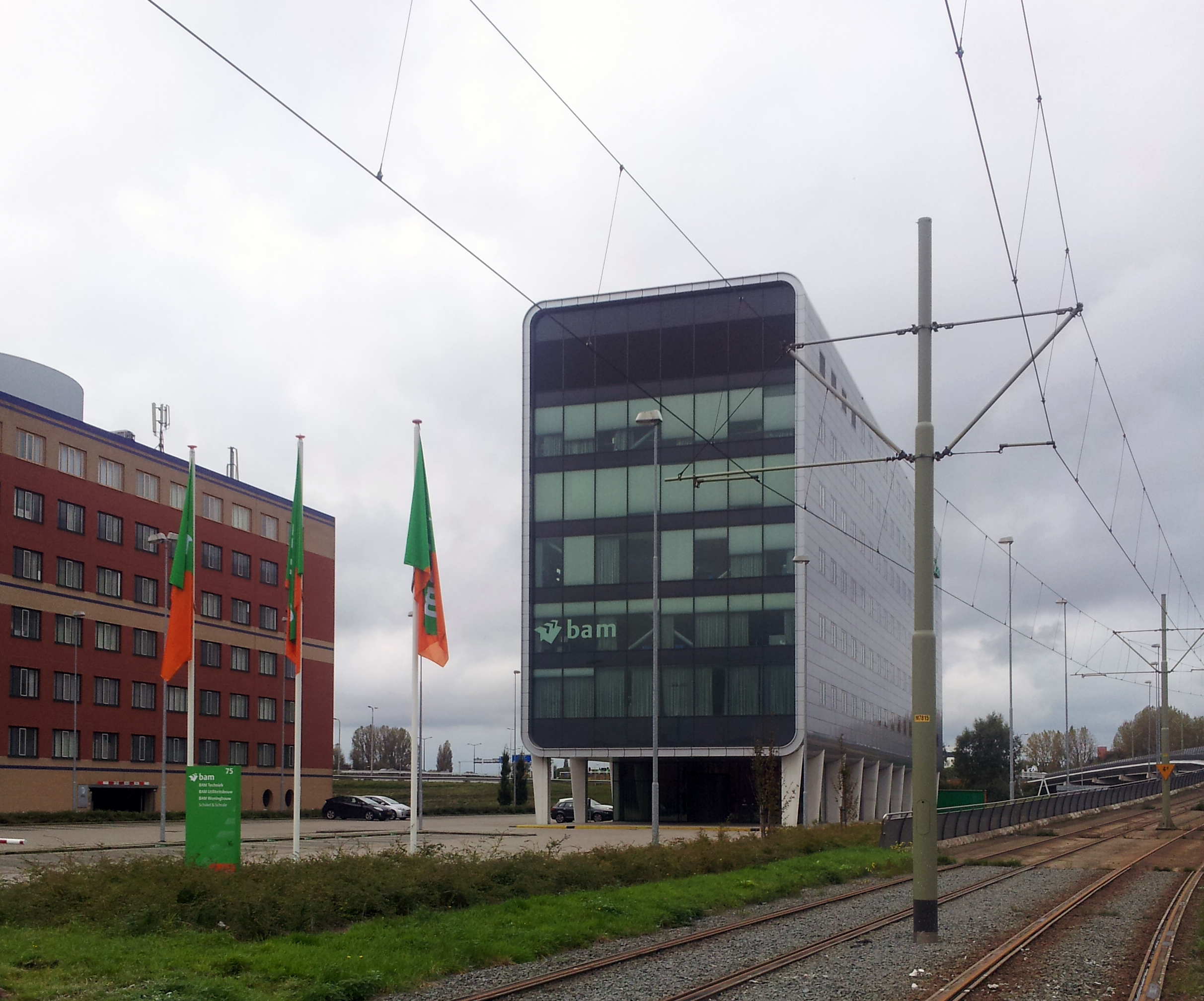 Office in Leidschendam